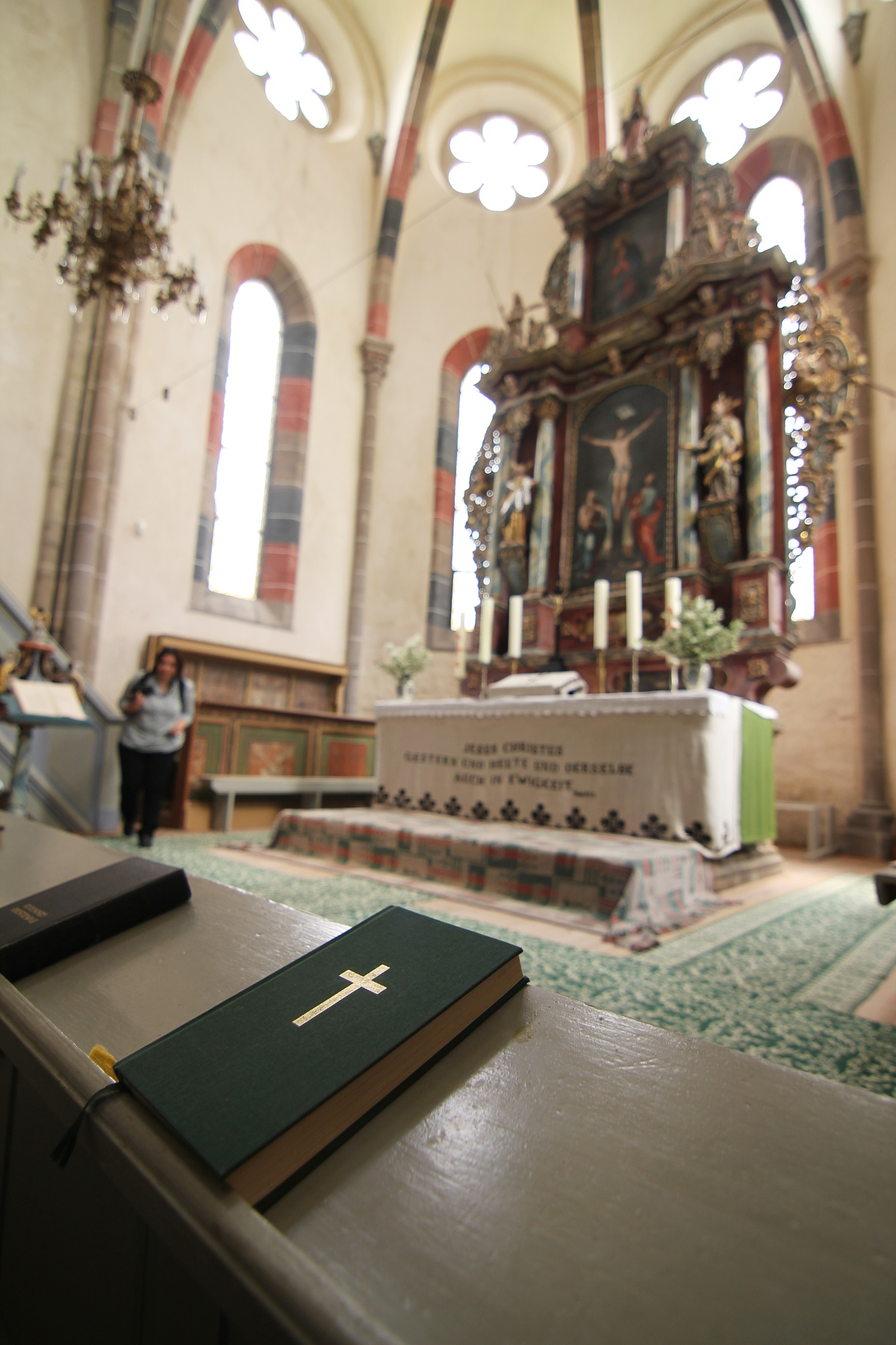 Biserica evanghelică din ansamblul fostei mănăstiri cisterciene Cârța 01